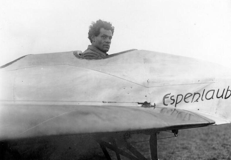 Der bekannte deutsche Segelflieger Espenlaub auf dem Bremerhavener Flugplatz abgestürzt und verletzt! Der bekannte Flieger Espenlaub, welche mit einem Raketen-Flugzeug auf dem Bremerhavener Flugplatz bei Versuchen abstürzte und verletzt wurde.